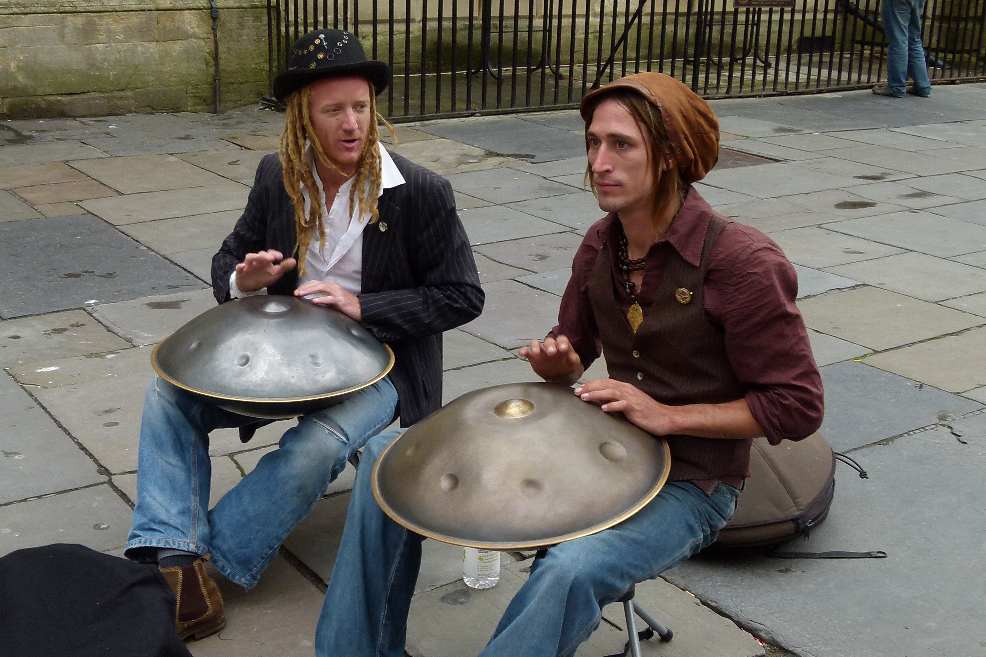 Musiker mit Hangs in Bath, Großbritannien. Das Instrument wurde im Jahr 2000 von Felix Rohner und Sabine Schärer in Bern (Schweiz) erfunden und besteht aus gasnitriertem Stahlblech. Hang bedeutet "Hand" in der Berner Mundart.